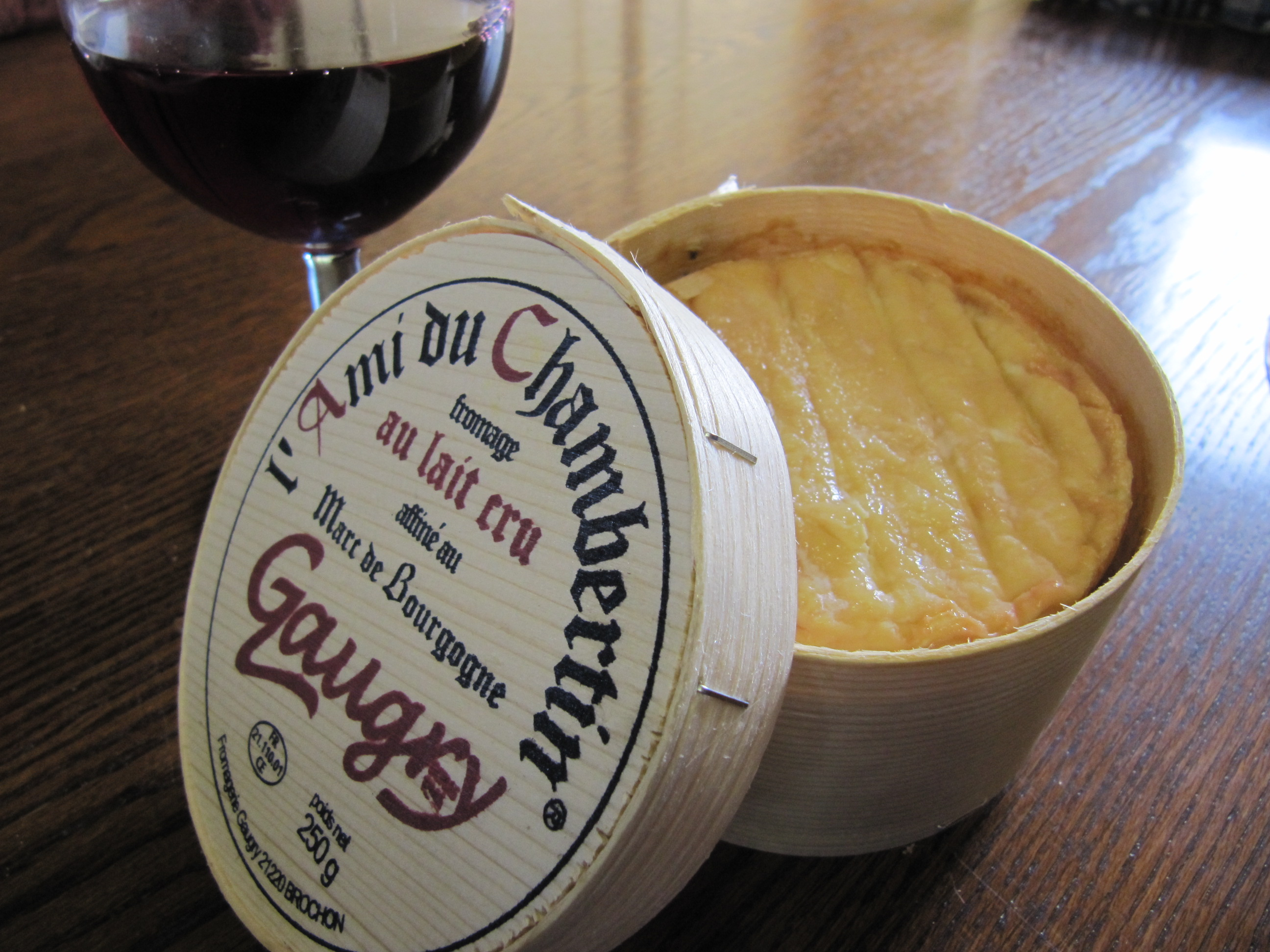 L'ami de Chambertin, un fromage de Bourgogne à pâte lavée